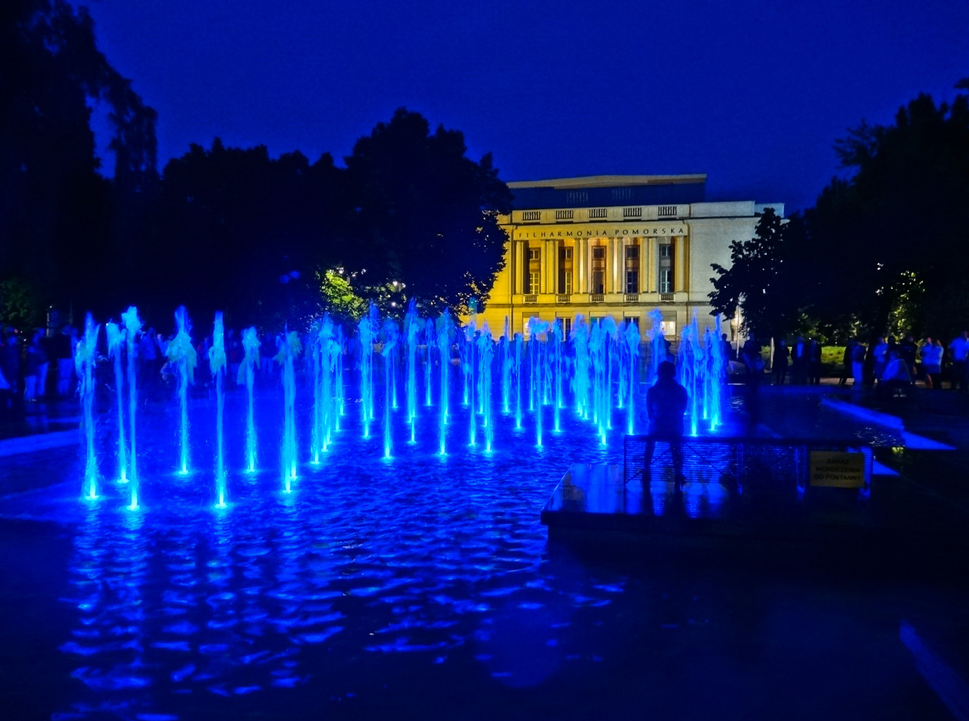 Fontanna przed budynkiem Filharmonii Pomorskiej im. Ignacego Jana Paderewskiego w Bydgoszczy, przebudowana w 2014 r., Dysponuje podświetlanymi dyszami wodnymi sterowanymi elektronicznie np. w rytm muzyki